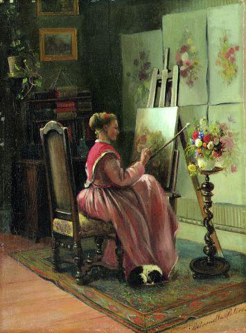 Die junge Künstlerin Anna Peters an der Staffelei in ihrem Atelier (Stuttgart, Reinsburgstraße 1), um 1870